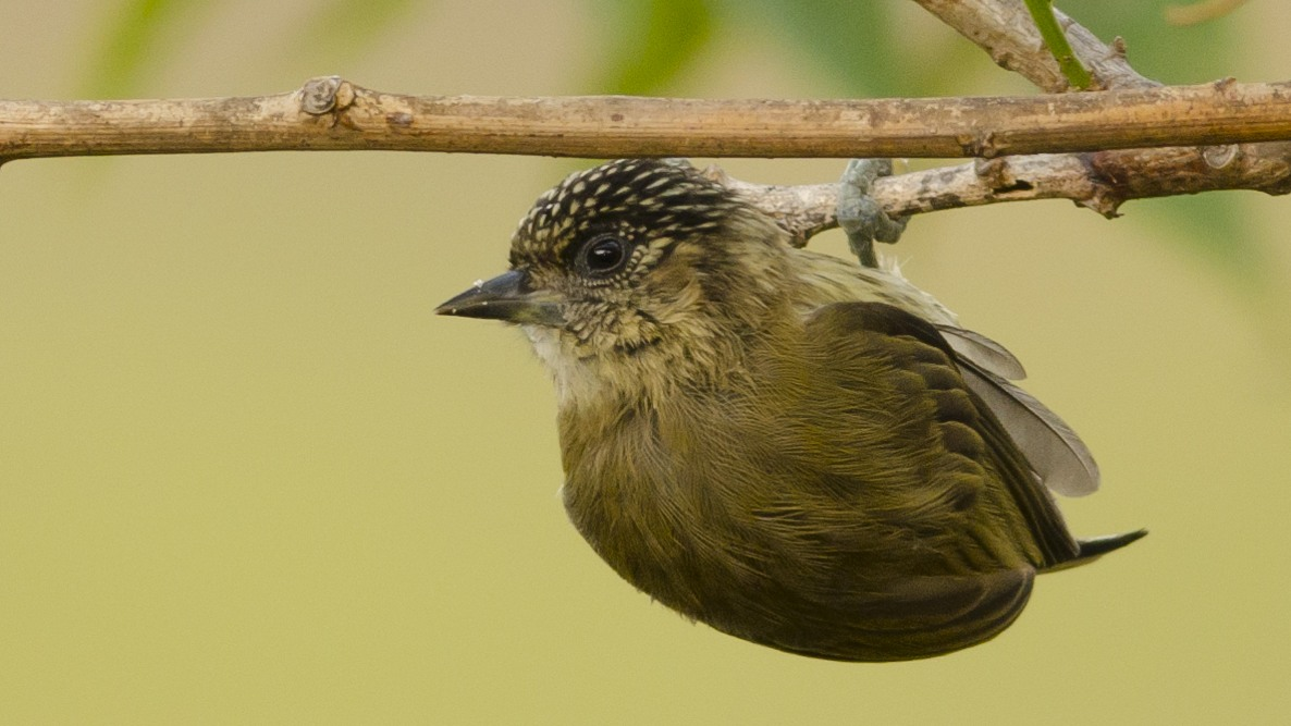 Picumnus olivaceus hembra